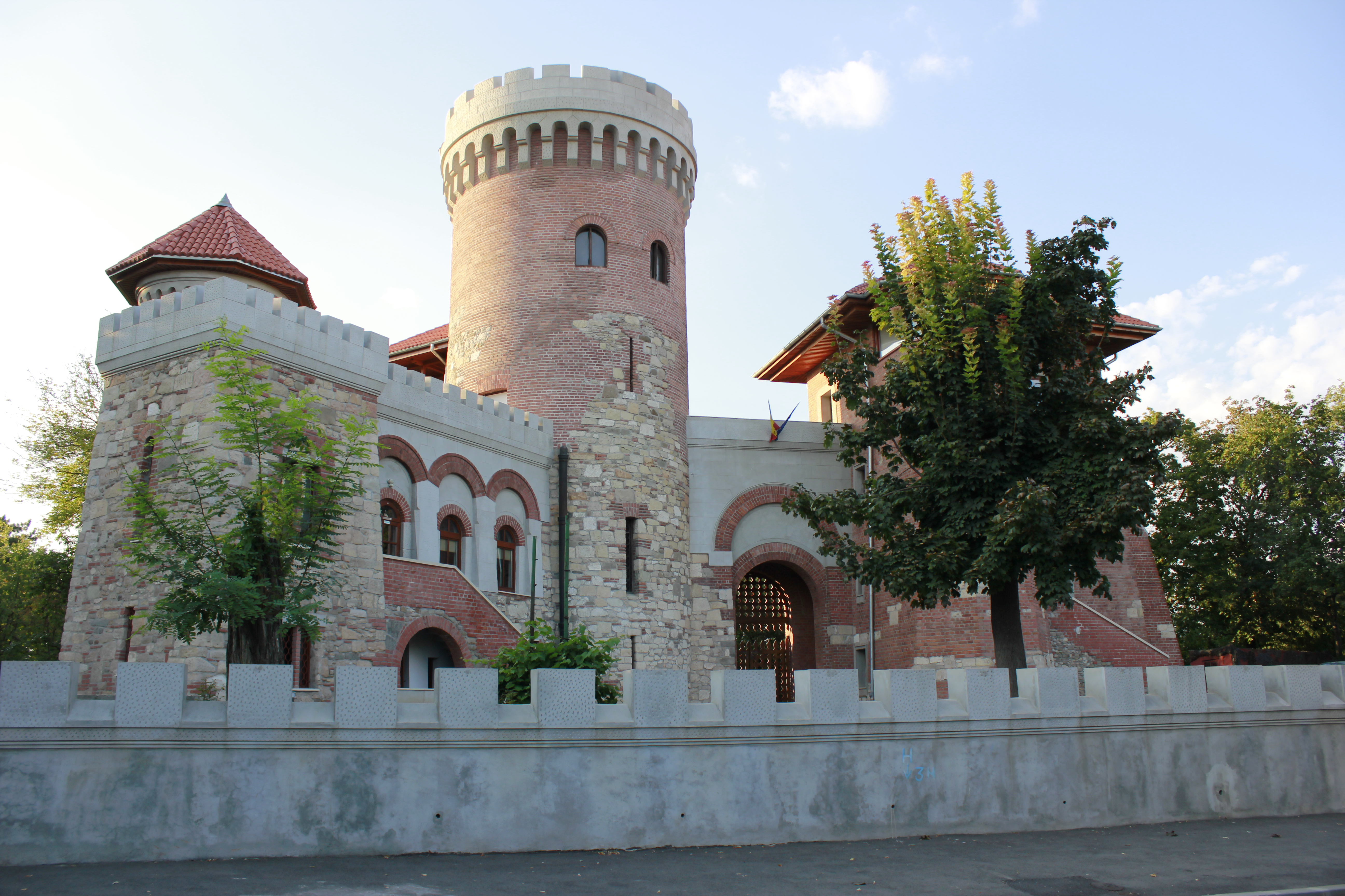 Emblemă a Parcului Carol.